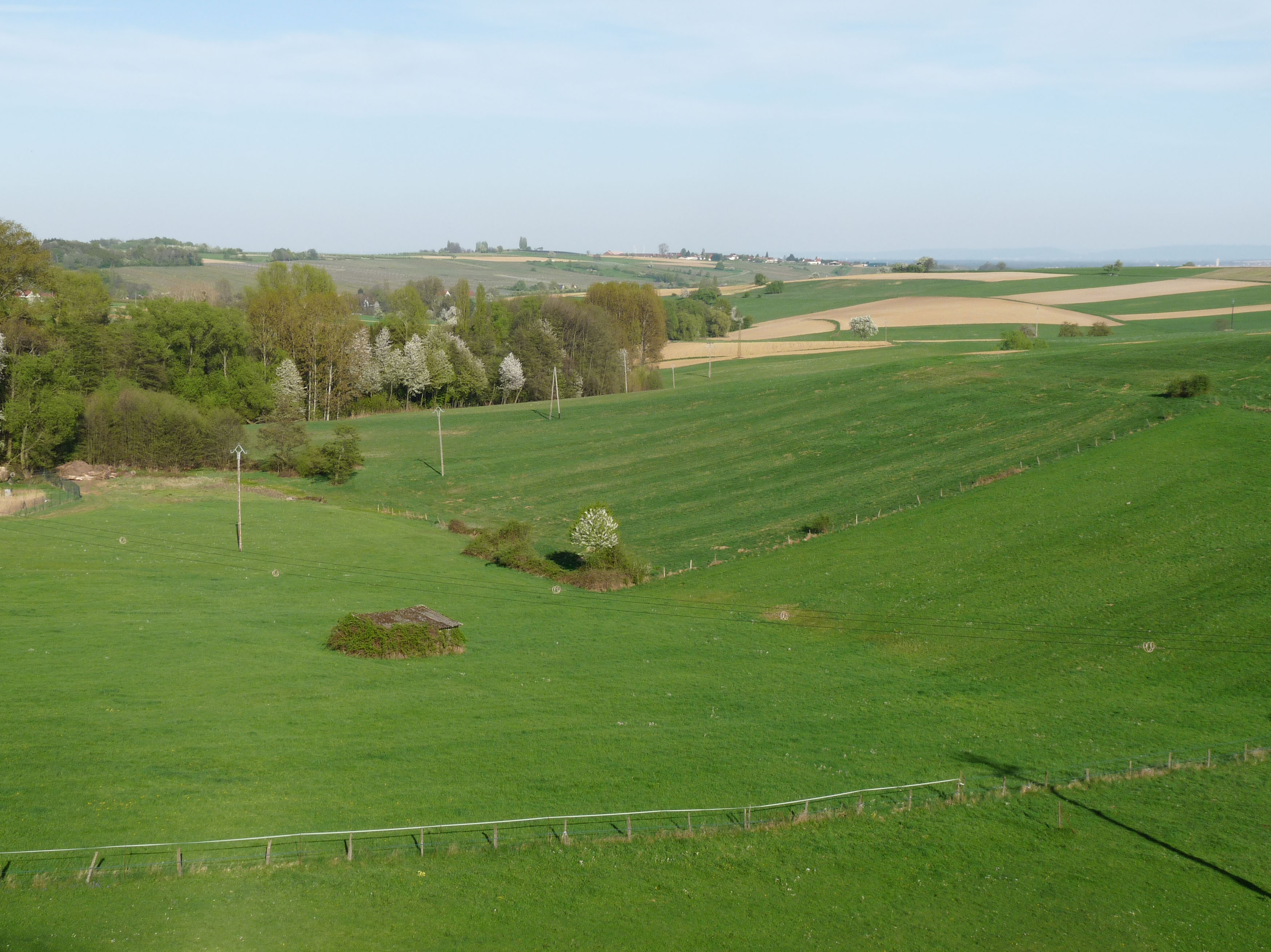 Environs de Rott (Bas-Rhin)